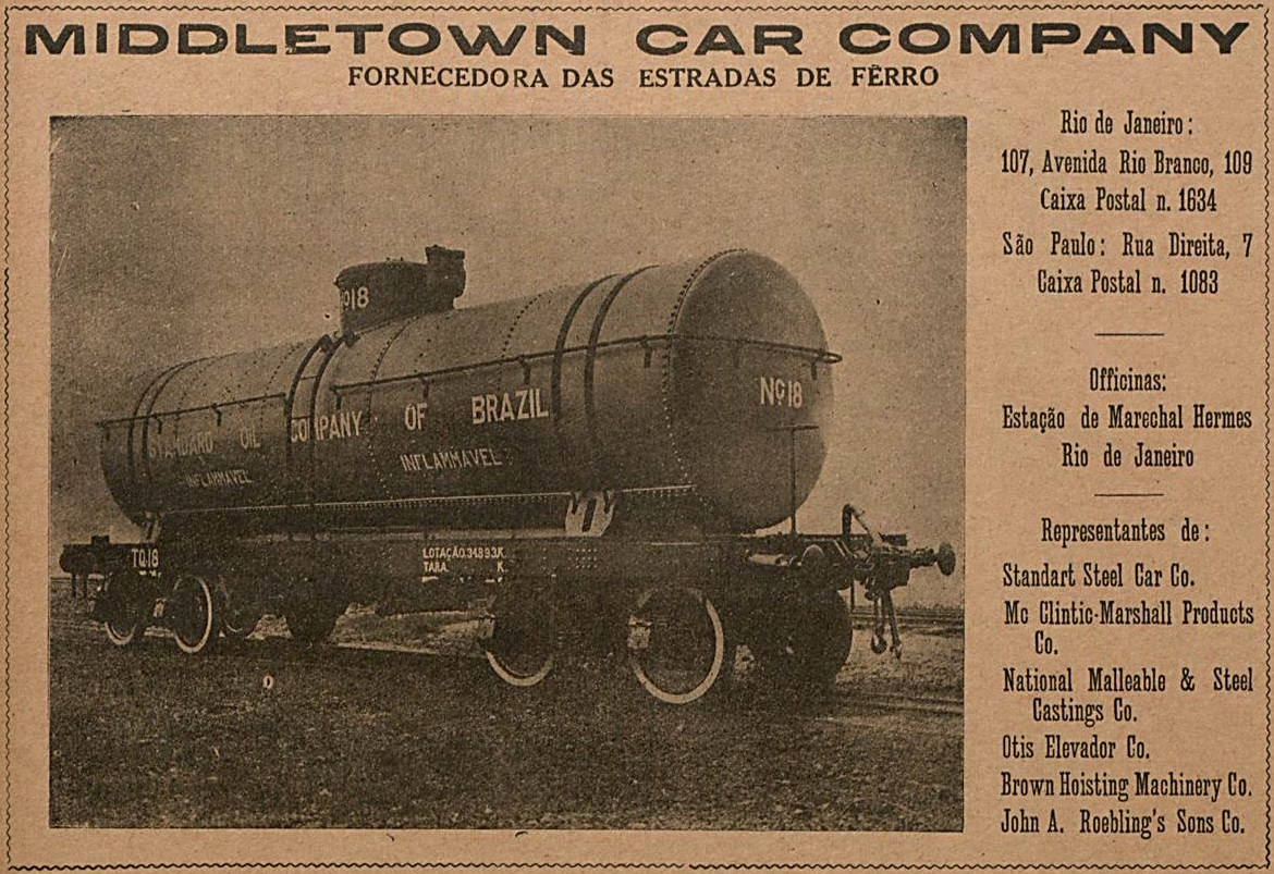 Anúncio publicitário da Middletown Car Company publicado em uma revista brasileira, destacando a fabricação e montagem de vagões no Brasil.